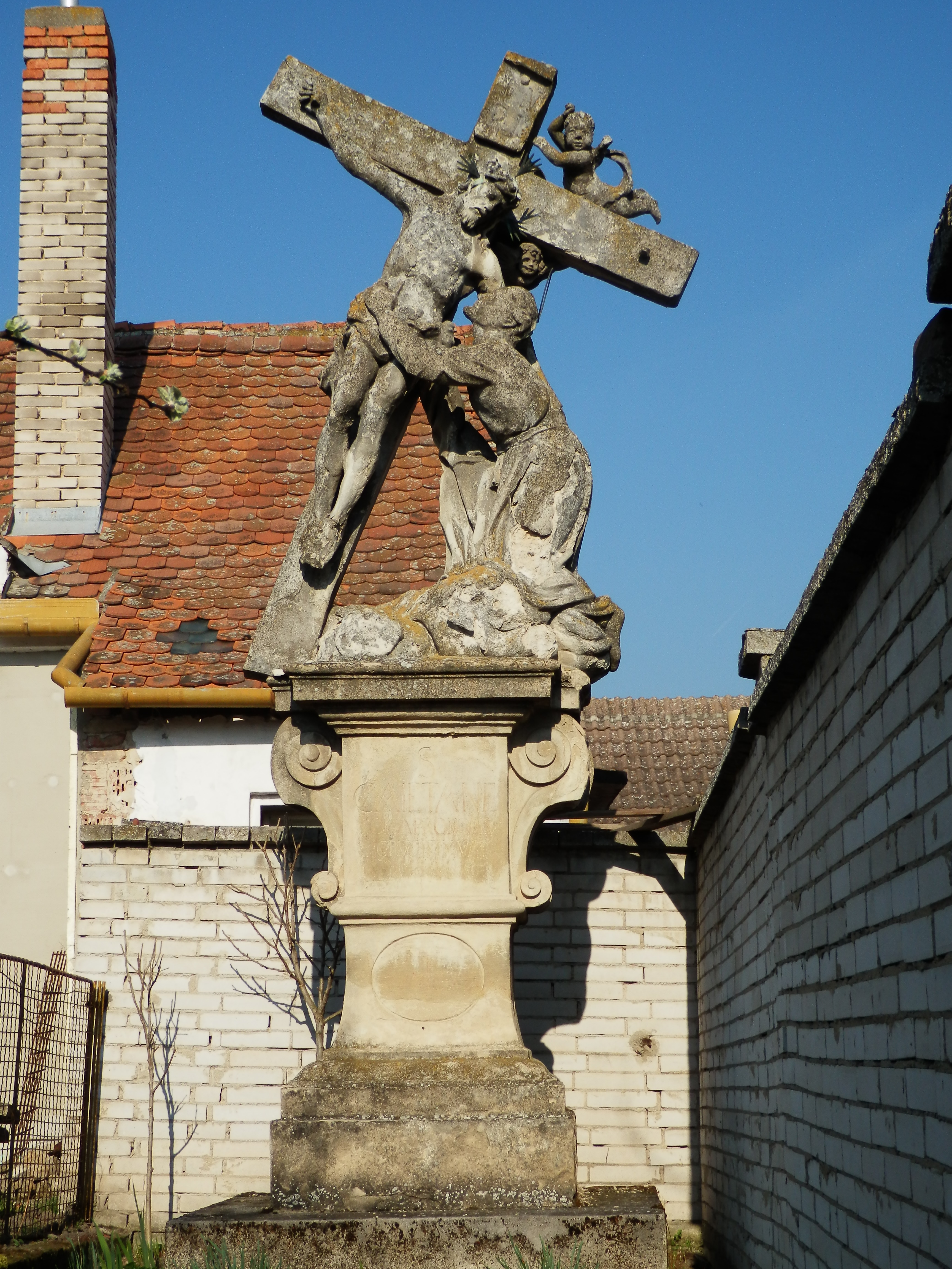 Socha sv. Kajetána (Čejč), předzahrádka při čp. 99, ul. Nádražní, Čejč